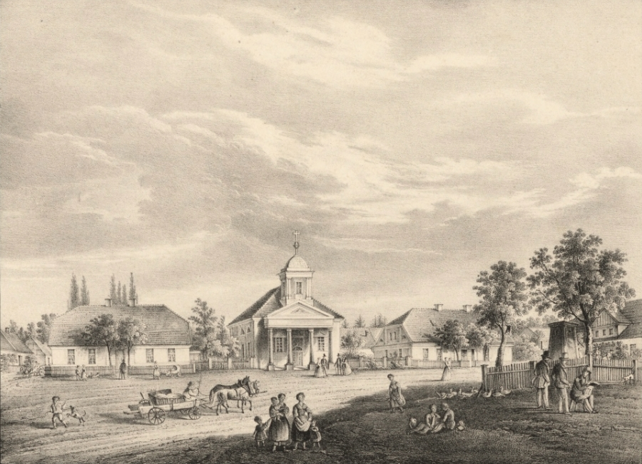 Die Nordseite des Hüttenplatzes in Jakobswalde in Oberschlesien mit Kirche und Schule im 19. Jahrhundert.